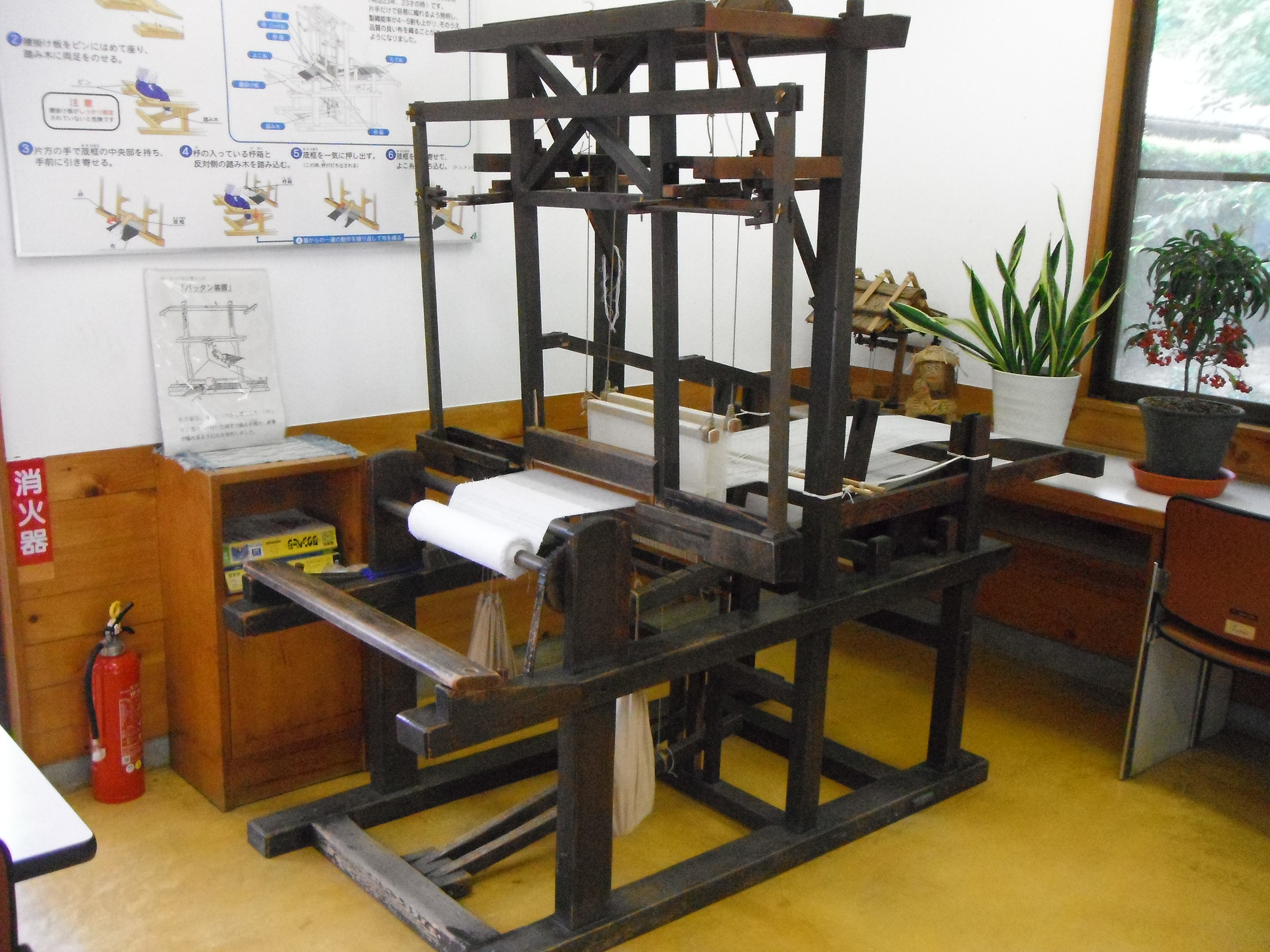 豊田式木製人力織機（1890年発明）